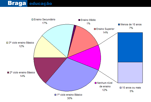 Braga-educaçao